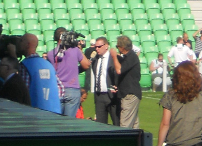 Hans Nijland wordt geïnterviewd door de NOS in gezelschap van Jan Mulder voorafgaand aan de wedstrijd FC Groningen tegen Ajax (1-0).